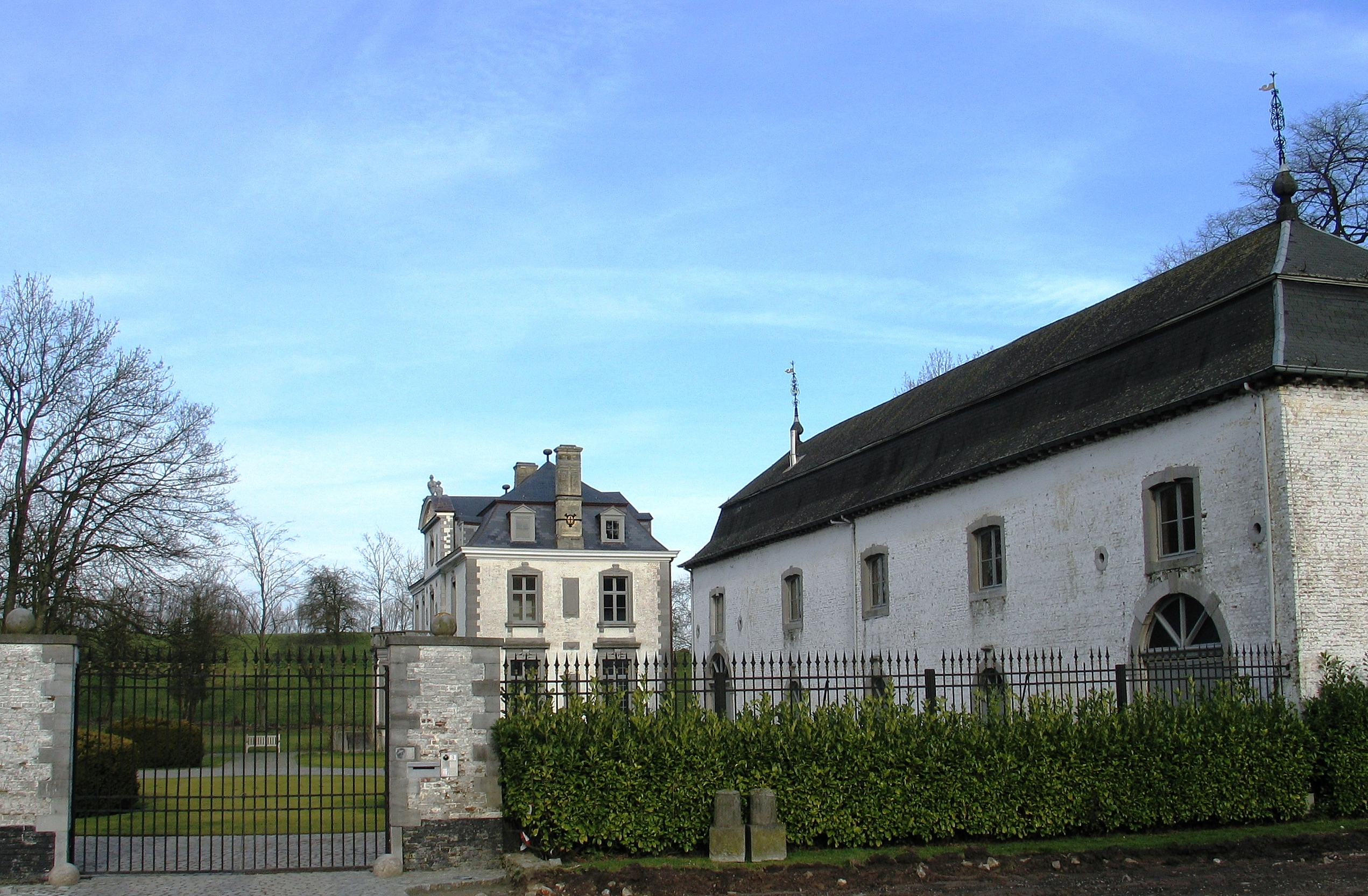 Kasteel van Opleeuw in Borgloon, België